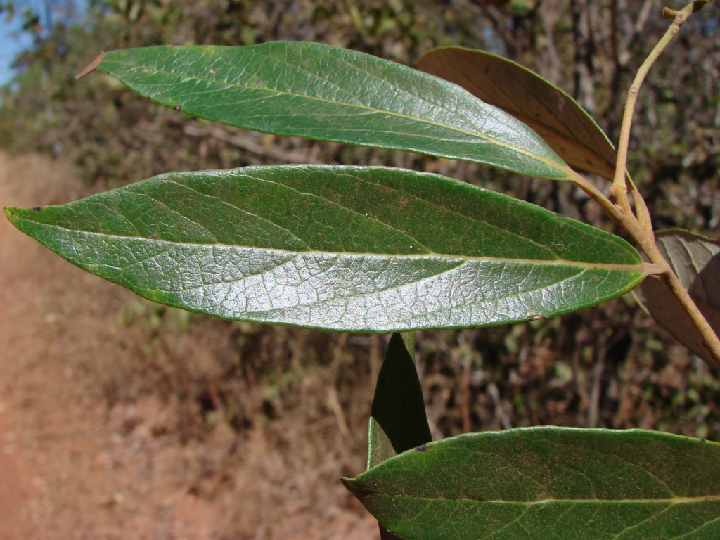 Leaves of Ocotea aciphylla (Nees & Mart.) Mez - LAURACEAE - Jardim Botânico de Brasília - Brasília - Distrito Federal - Brasil.